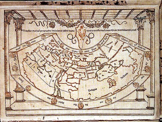 Mapa de Pomponio Mela según Petrus Bertíus siglo XVII.